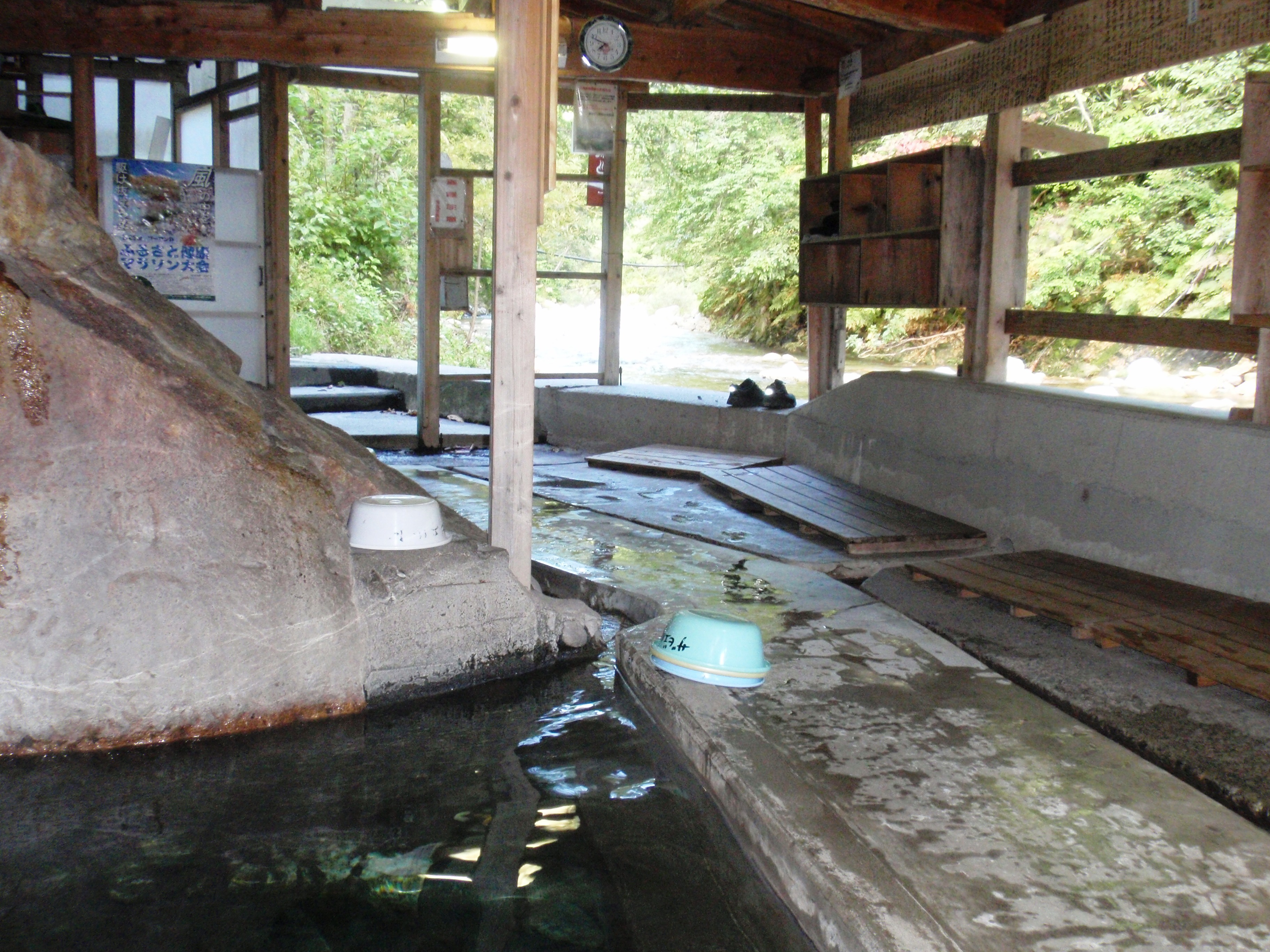 福島県南会津町木賊（とくさ）温泉の共同浴場、岩風呂。